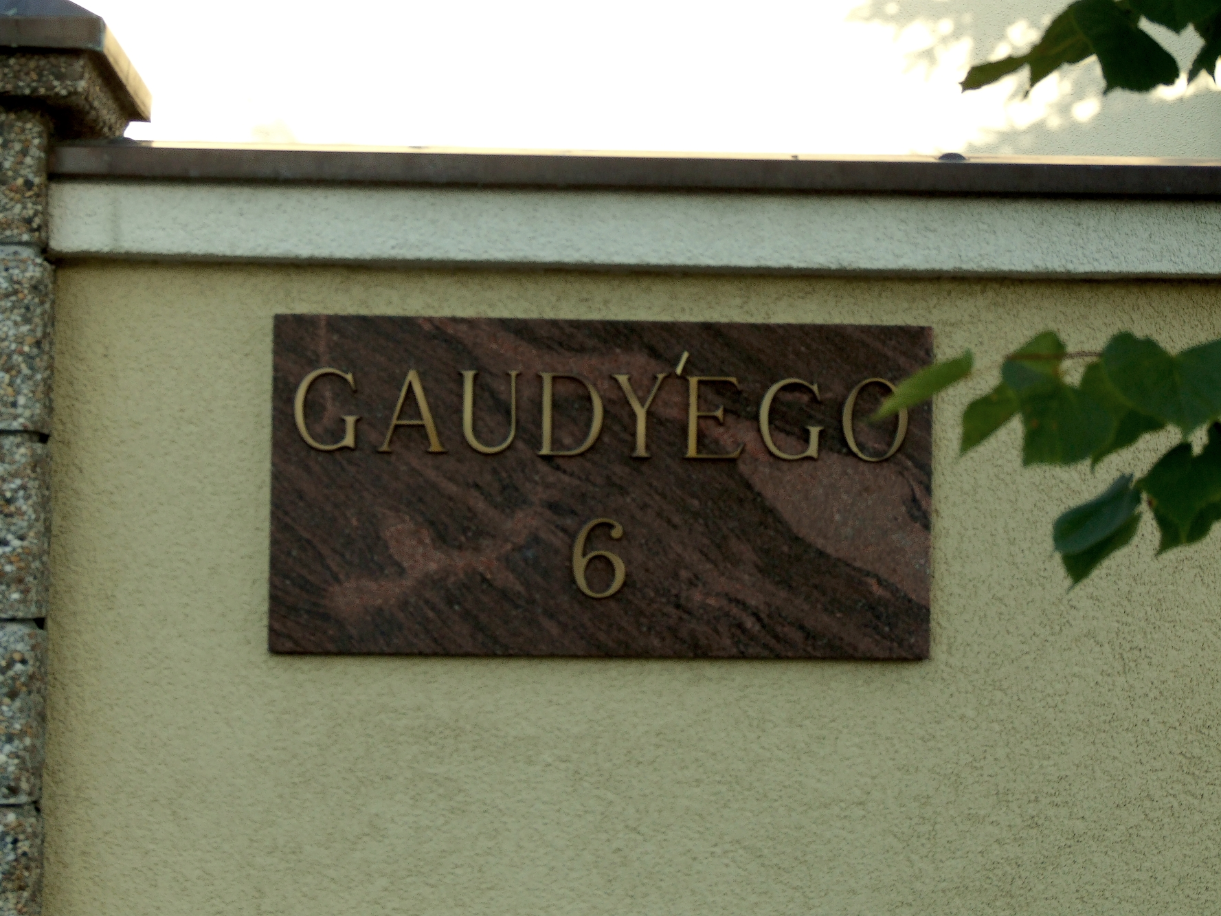 Błąd ortograficzny i interpunkcyjny w nazwie ulicy Gaudiego